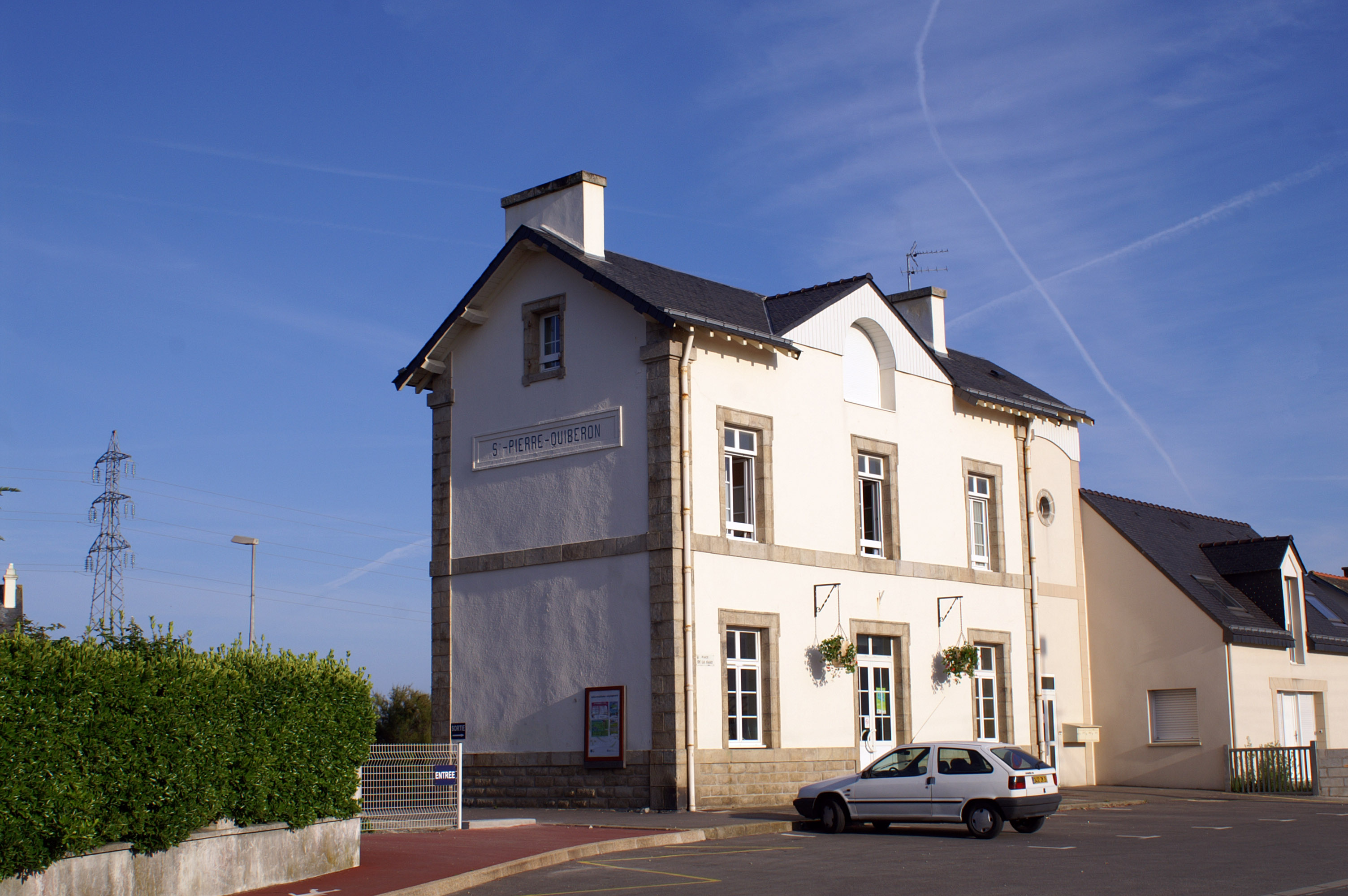 Bâtiment voyageurs, côté extérieur, de la gare de Saint-Pierre-Quiberon dans le Morbihan.